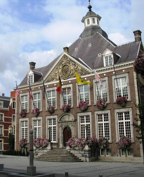 Stadhuis Hasselt (België) - eigen foto